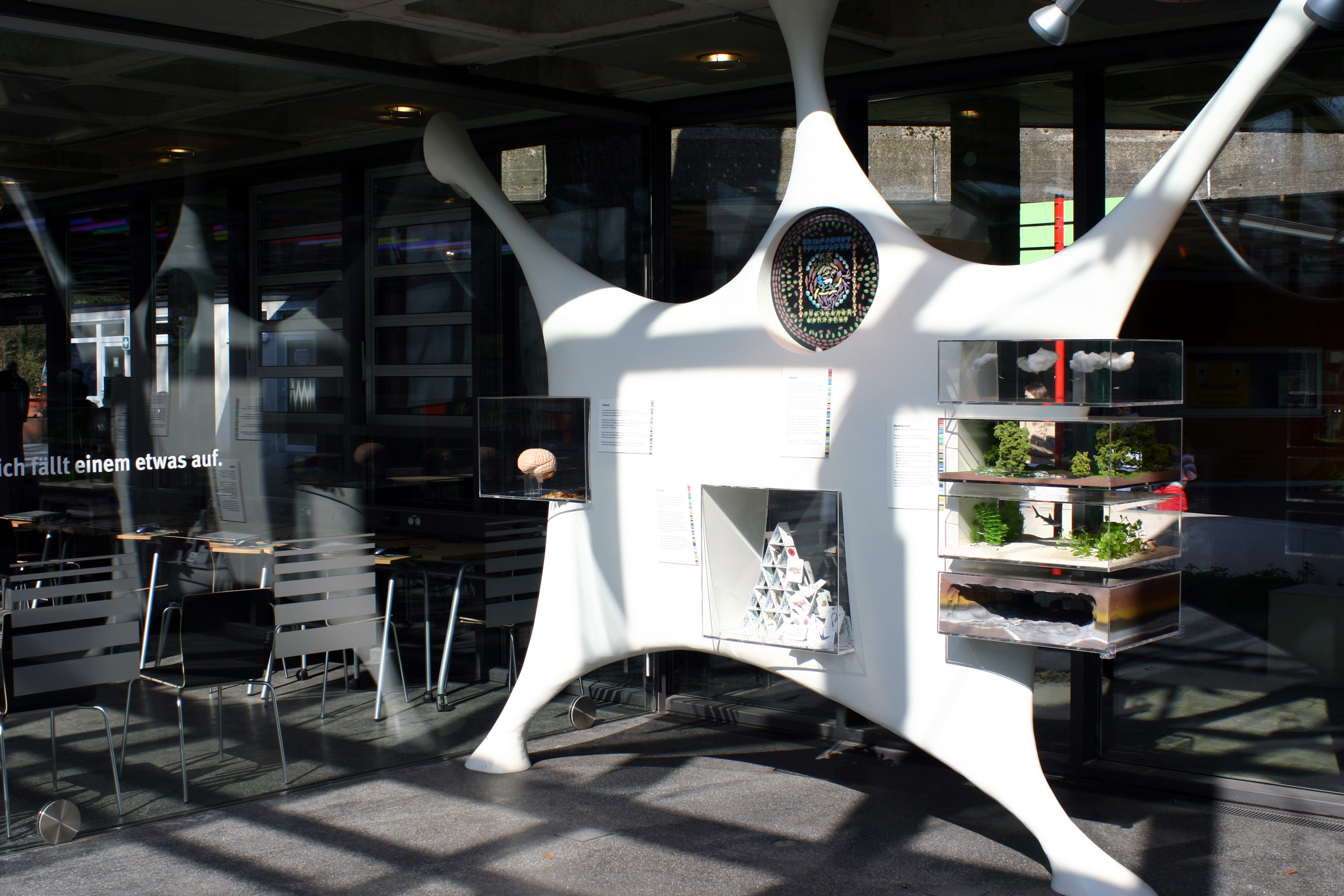 BiOCity: Centrum zur Erforschung der Biodiversität